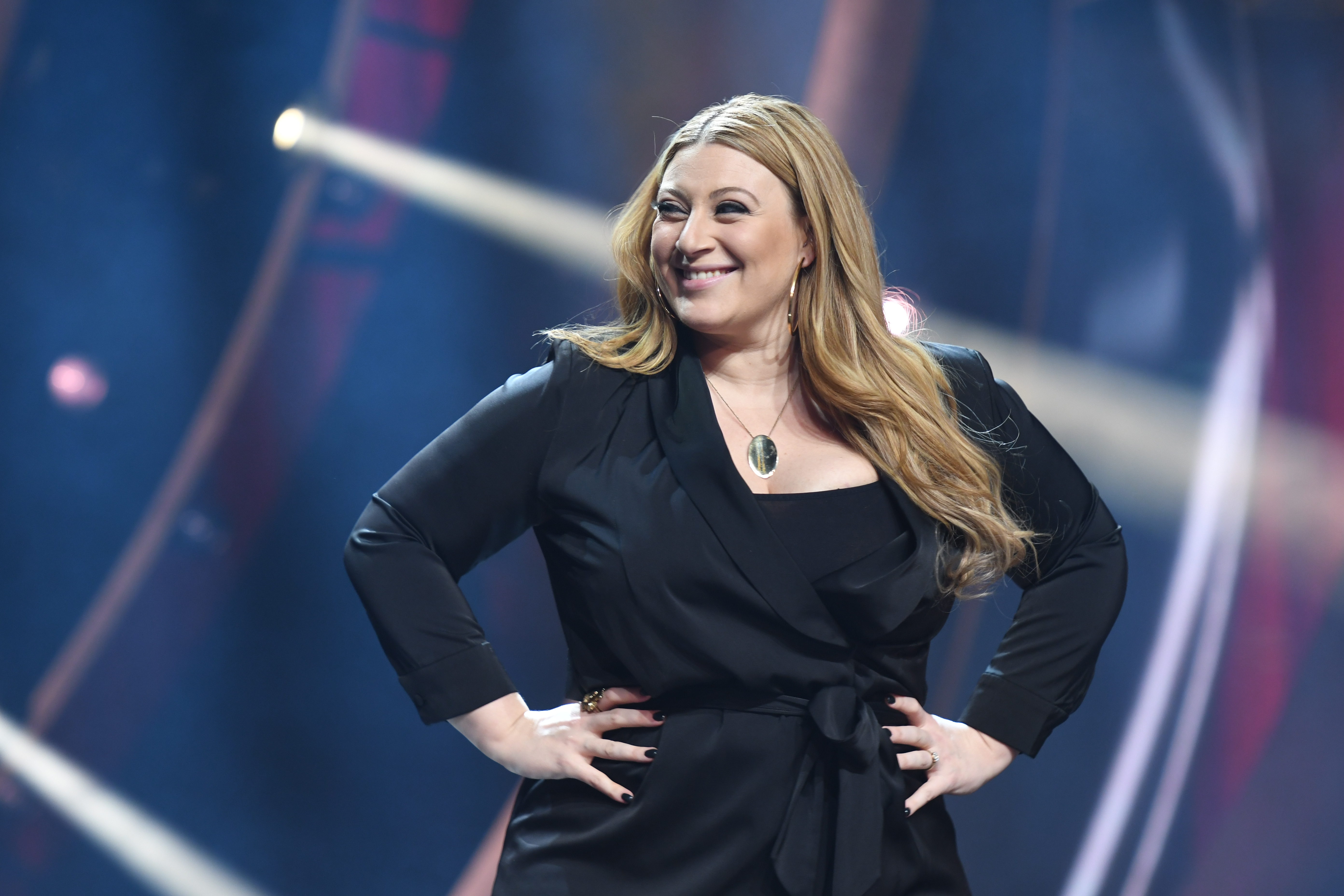 Melodifestivalen 2019, deltävling 1, Scandinavium, Göteborg, presskonferens, Sarah Dawn Finer